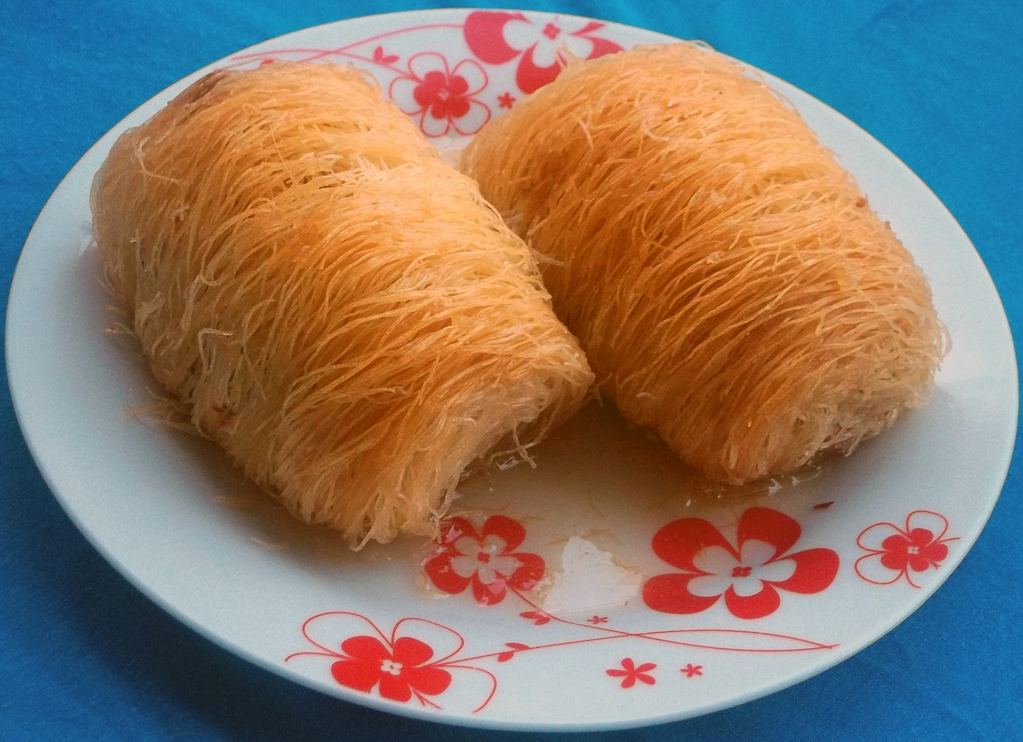 Γλυκό Κανταΐφι